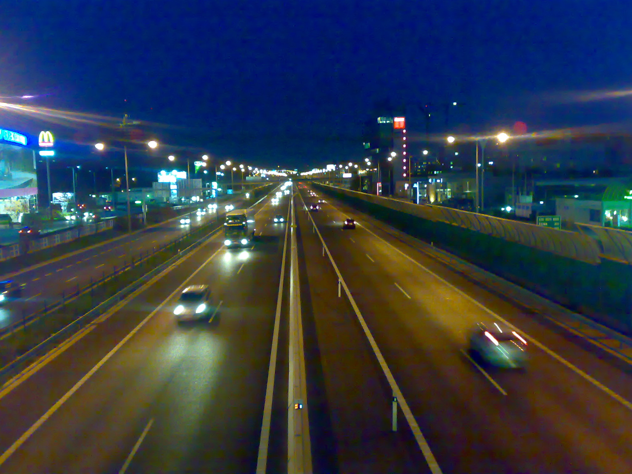 Dialnica D1 v BA-Petrzalka